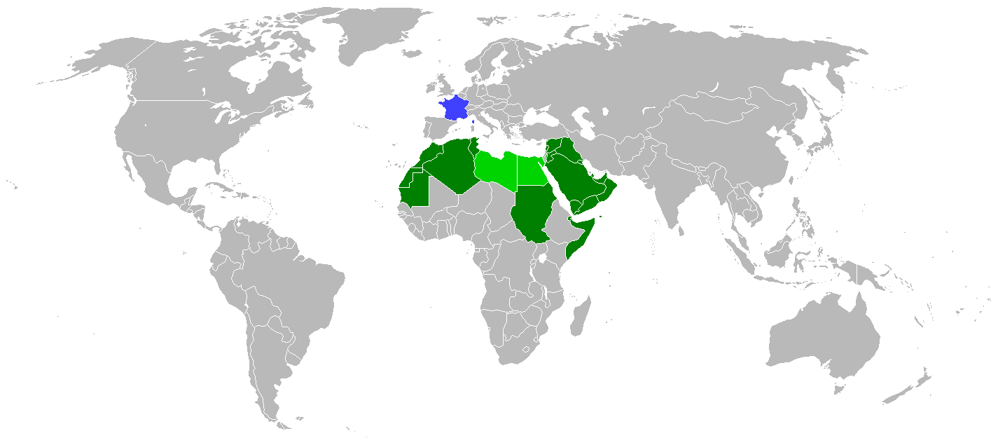 Carte représentant les États membres de l'Institut du monde arabe, à savoir : le pays hôte : France les États fondateurs : Algérie Arabie saoudite Bahreïn Djibouti Émirats arabes unis Irak Jordanie Koweït Liban Maroc Mauritanie Oman Qatar Somalie Soudan Syrie Tunisie Yémen (à l'époque République démocratique populaire du Yémen et République arabe du Yémen) les autres États membres : Libye (1988) Égypte (1989) Palestine (1989) La carte montre les frontières telles qu'elles étaient à la signature de l'acte de fondation, le 28 février 1980, et à la date d'adoption des statuts de la fondation, le 23 juin 1980 (la zone neutre Irak-Arabie saoudite n'est pas représentée).